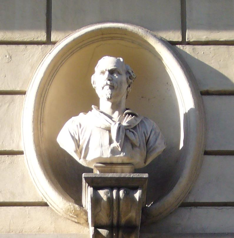 Roma, ritratto di Ciceruacchio (Angelo Brunetti) a via Ripetta 248 (1872)